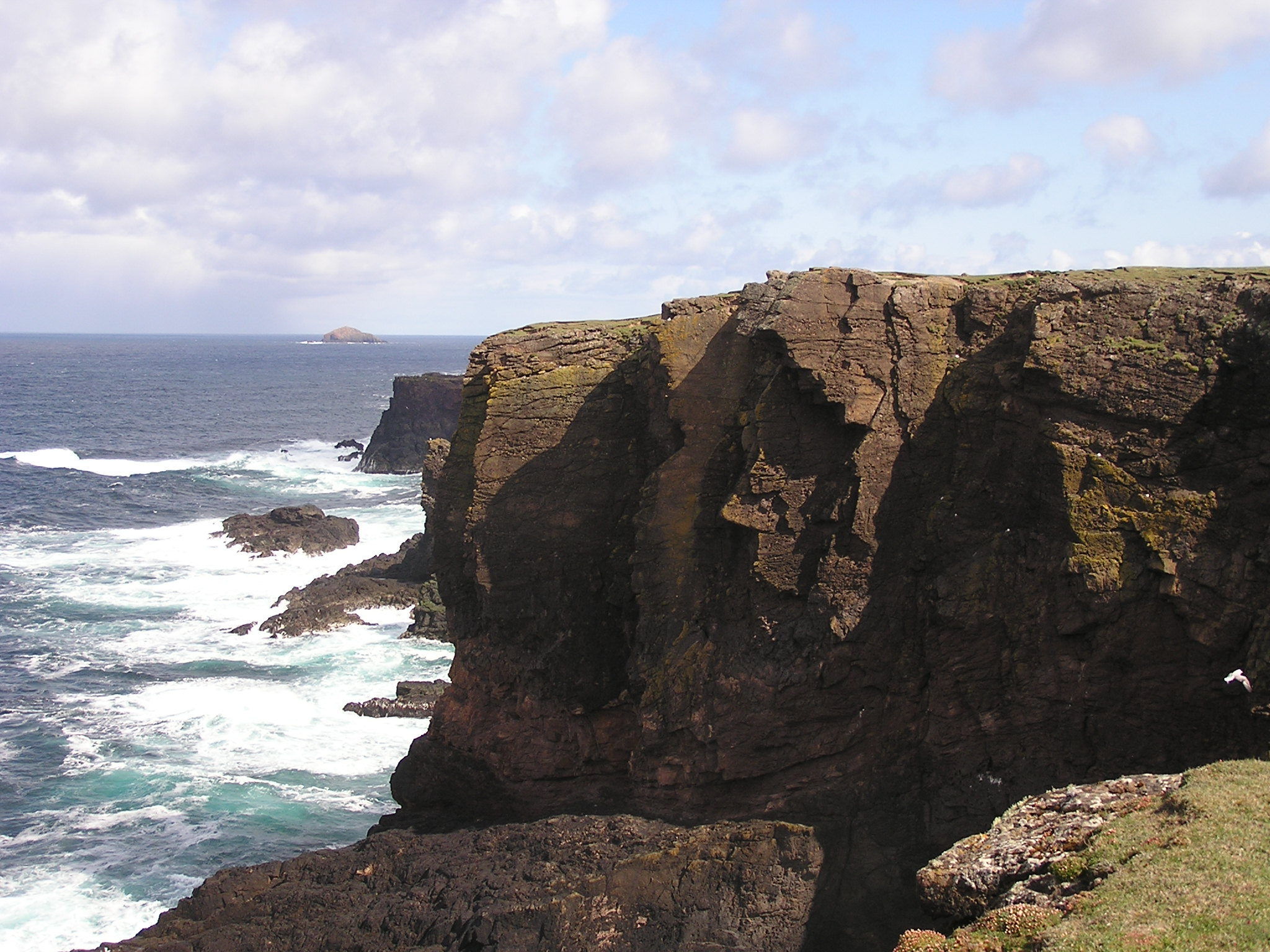 Klippenküste bei Eshaness, Mainland, Shetland